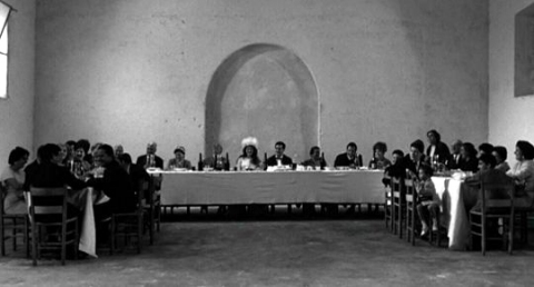 Screenshot from Mamma Roma directed by Pier Paolo Pasolini